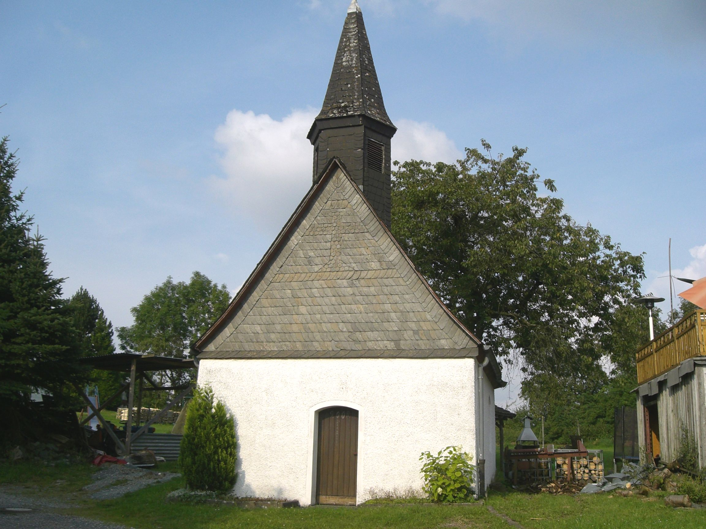 Ansicht der Kapelle St. Martin in Lennestadt-Brenschede